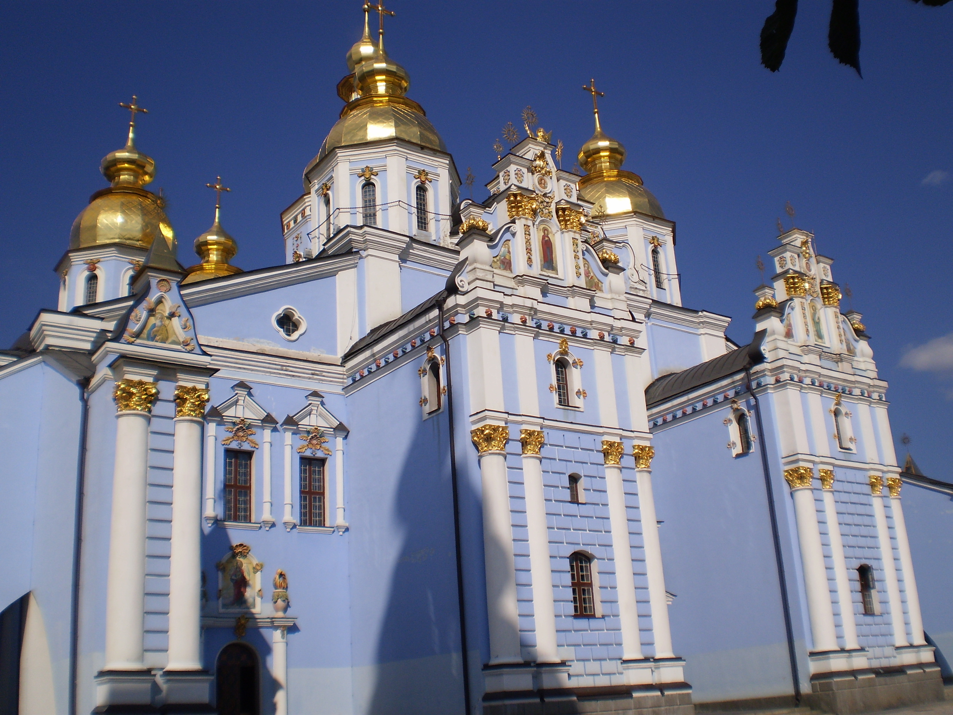 Комплекс Михайлівського Золотоверхого монастиря, Київ, Трьохсвятительська вул., 6